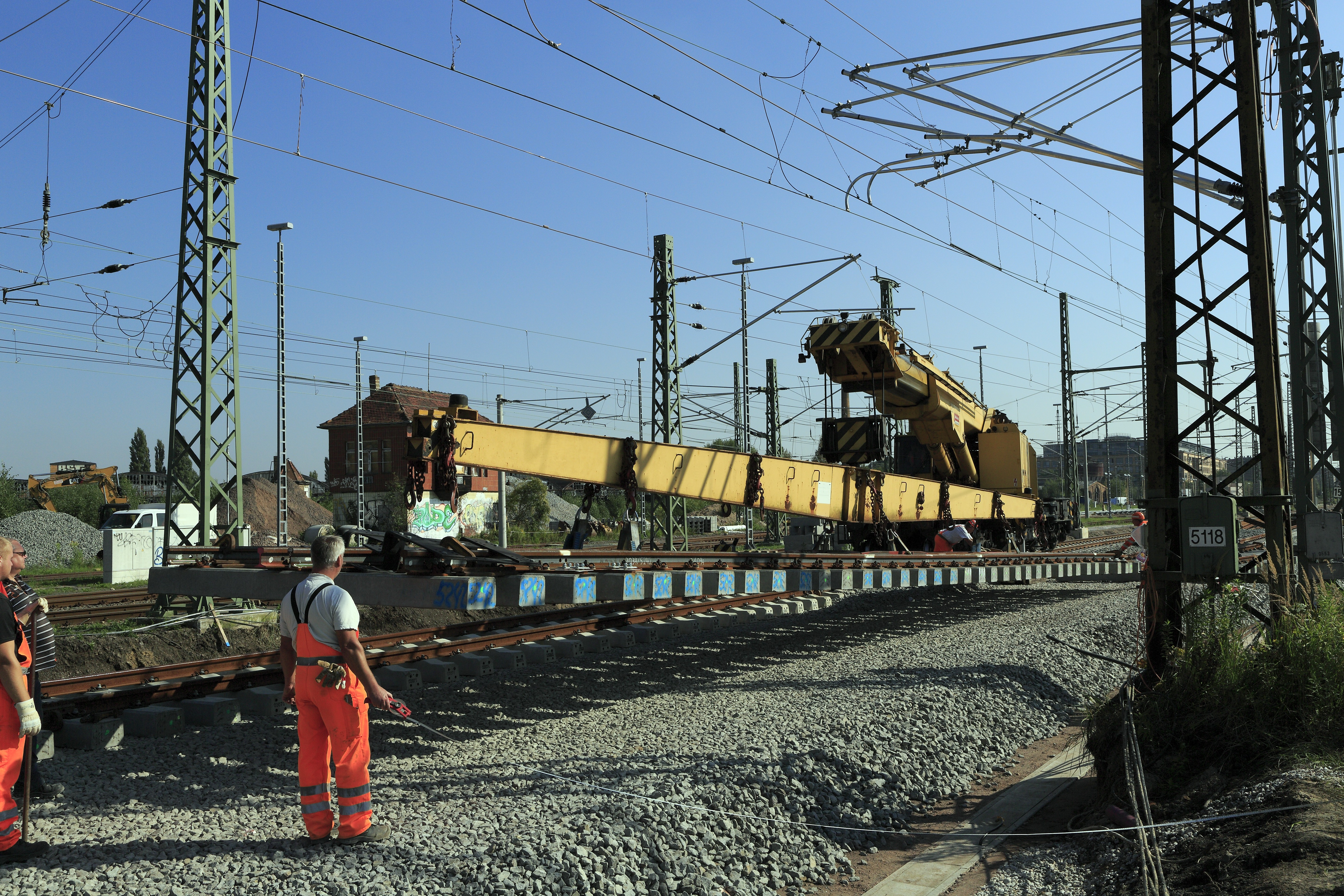 DKW 54-190-1:9, das Mittelteil mit Zungenvorrichtungen und Doppelherzstücken wurde vom Weichenwerk vormontiert geliefert und wird mittels Traverse in einem Stück eingebaut.